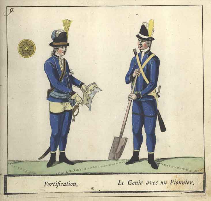 Fortifikationens uniform m/1779, ur C. G. Roos samling.